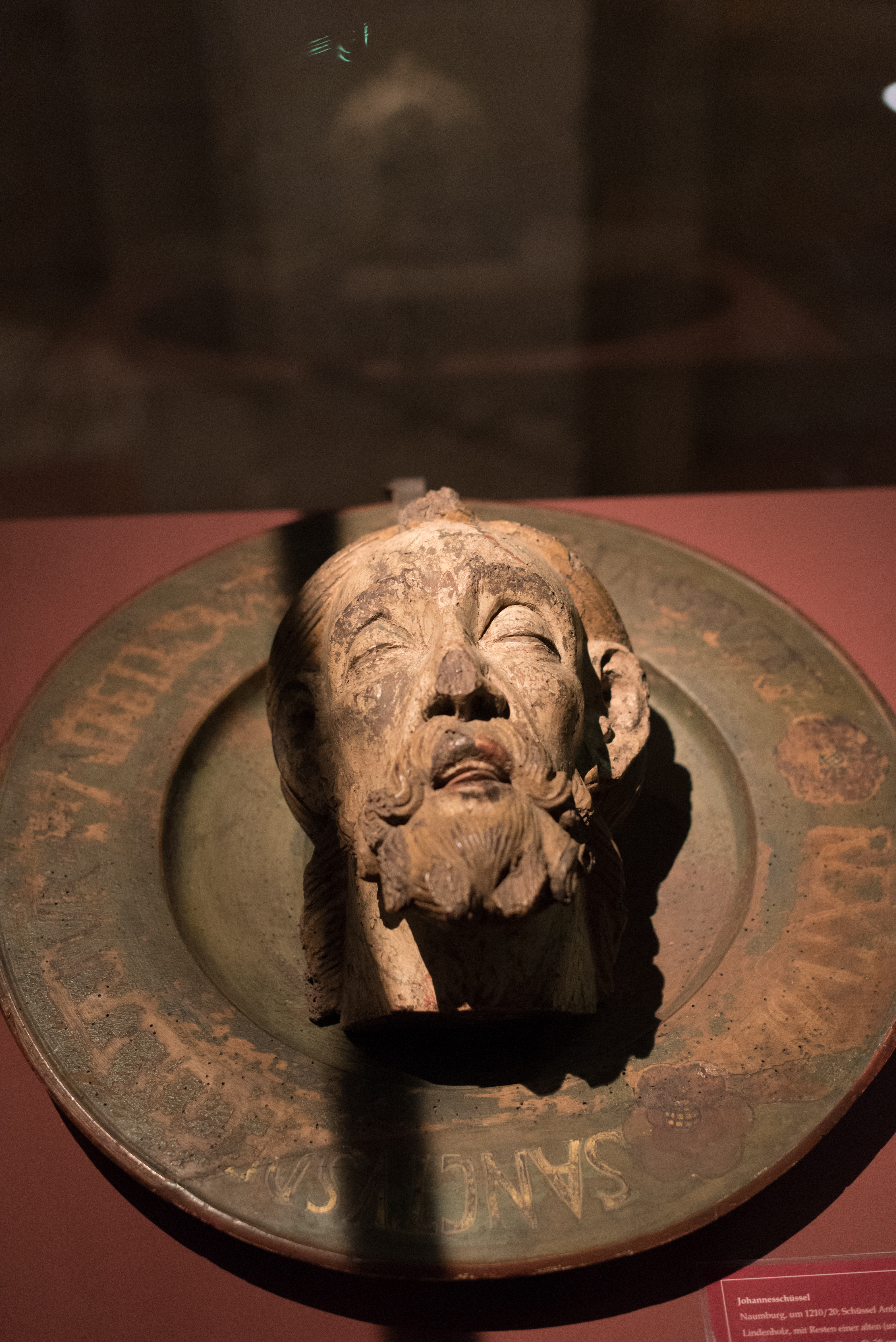 Naumburg, Dom, Domschatzkammer, Johannesschüssel